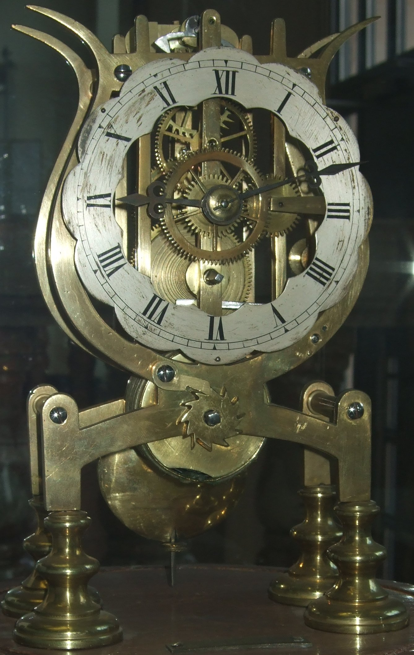 Skelettuhr. Federzug mit Schnecke. (Ausstellungsstück der Uhrensammlung Karl Gebhardt in Nürnberg )